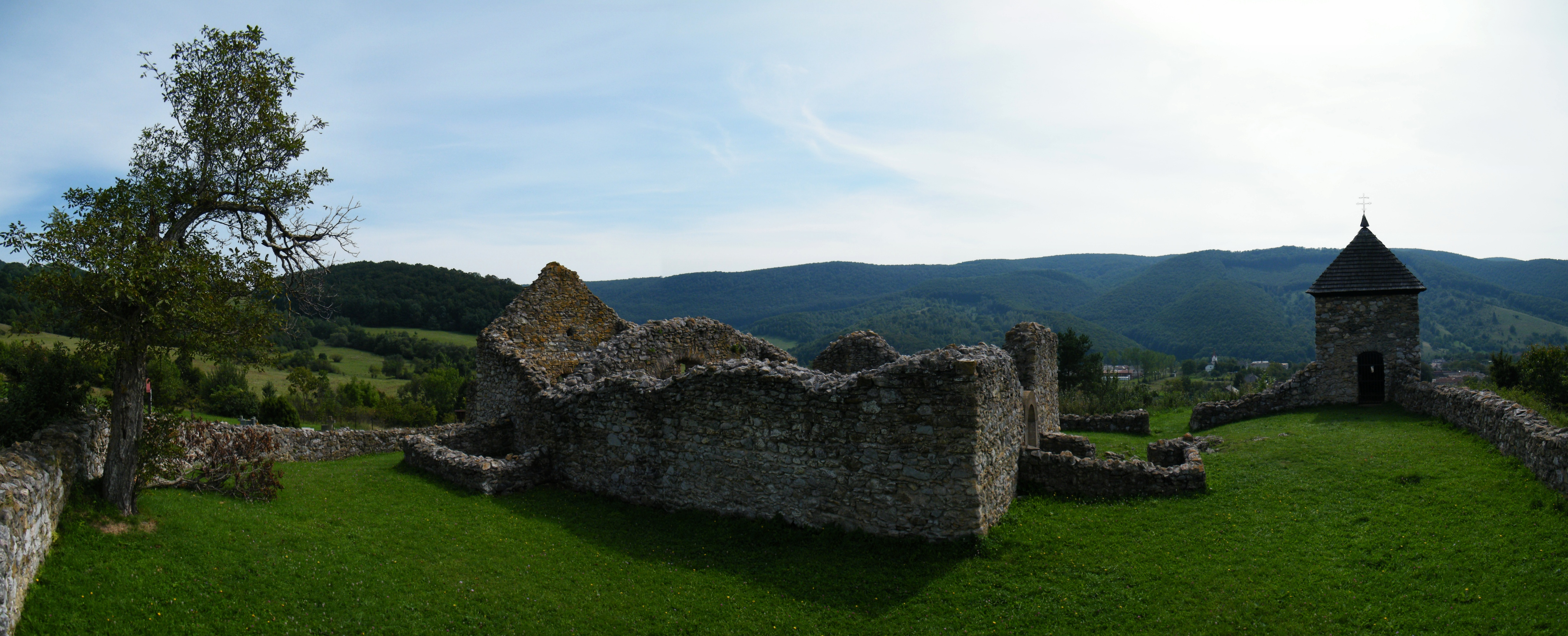 Kostol ruina